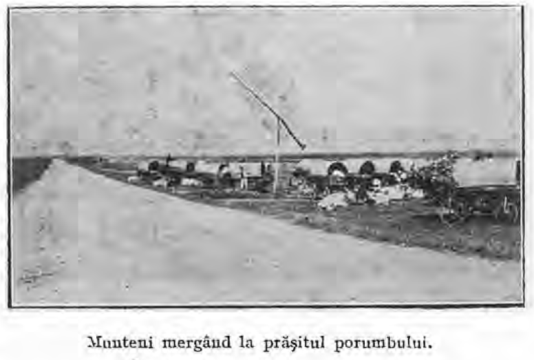 Autor – Macreanu Iulian Descriere - Fotografie ilustrând un aspect de viaţă din stepa Bărăganului, din primul deceniu al secolului XX Restricţii – fişierul poate fi utilizat fără nici o restricţie Precizări privind sursa - imaginile au fost extrase de mine din lucrarea “ Constantin Garoflid, Agricultura veche, Tiparul “Cartea Românească”, Bucureşti, 1943”, aflată deja în domeniul public din 1993. Autorul cărţii, Constantin Garoflid a decedat în 1943, („Constantin Garoflid (n. 1872; d. 1943) a fost un om politic român, care a îndeplinit funcția de ministru.” Sursa: Drepturile de autor au încetat în 1993, la 50 de ani de la moartea sa, în conformitate cu prevederile Decretului nr. 321 din 18 iunie 1956 privind dreptul de autor (Decretul nr. 321 din 18 iunie 1956 privind dreptul de autor După moartea autorului, de drepturile de autor se bucură (art. 6): a) soțul si ascendenții (părinții) autorului, pe tot timpul vieții fiecăruia; b) descendenții lui (copiii și urmașii lor), pe timp de 50 ani (nn. de la moartea autorului); Acest decret a rămas în vigoare până în 23 iunie 1996 inclusiv, iar unele prevederi chiar până în 29 iulie 2004 inclusiv. Sursa